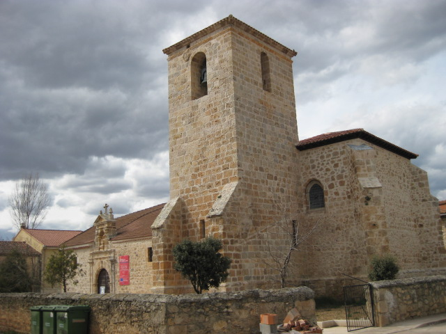 Iglesia de San Pedro, en Quintanarraya, Burgos (España)